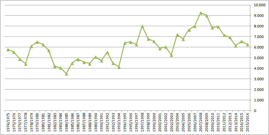 Zuschauerentwicklung der österreichischen Fußball-Bundesliga